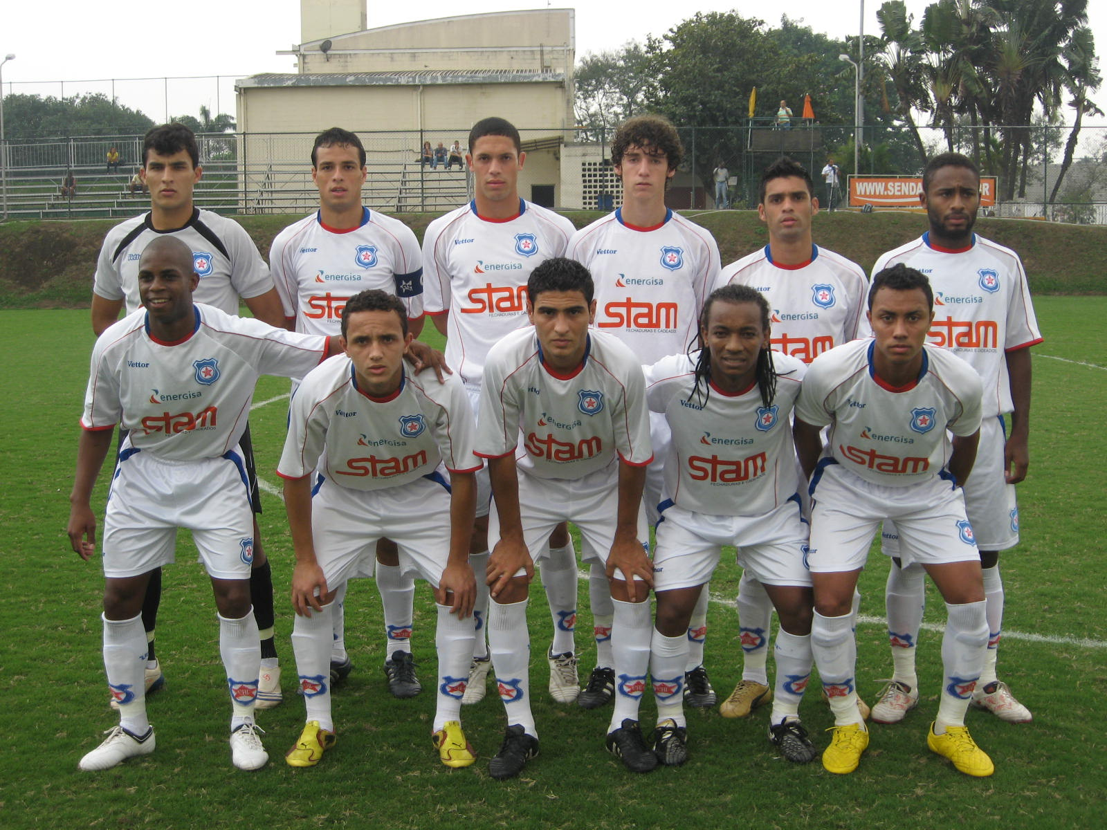 Equipe profissional do Friburguense em 2010.